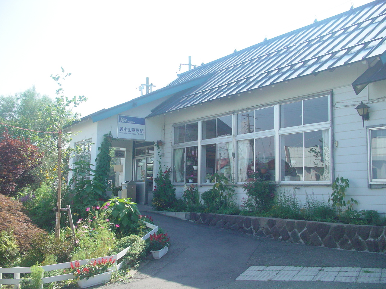 （奥中山高原駅）